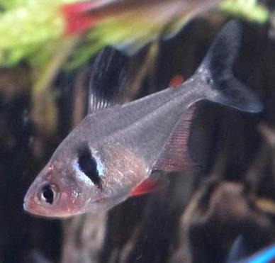 ブラックファントムテトラ（雌）